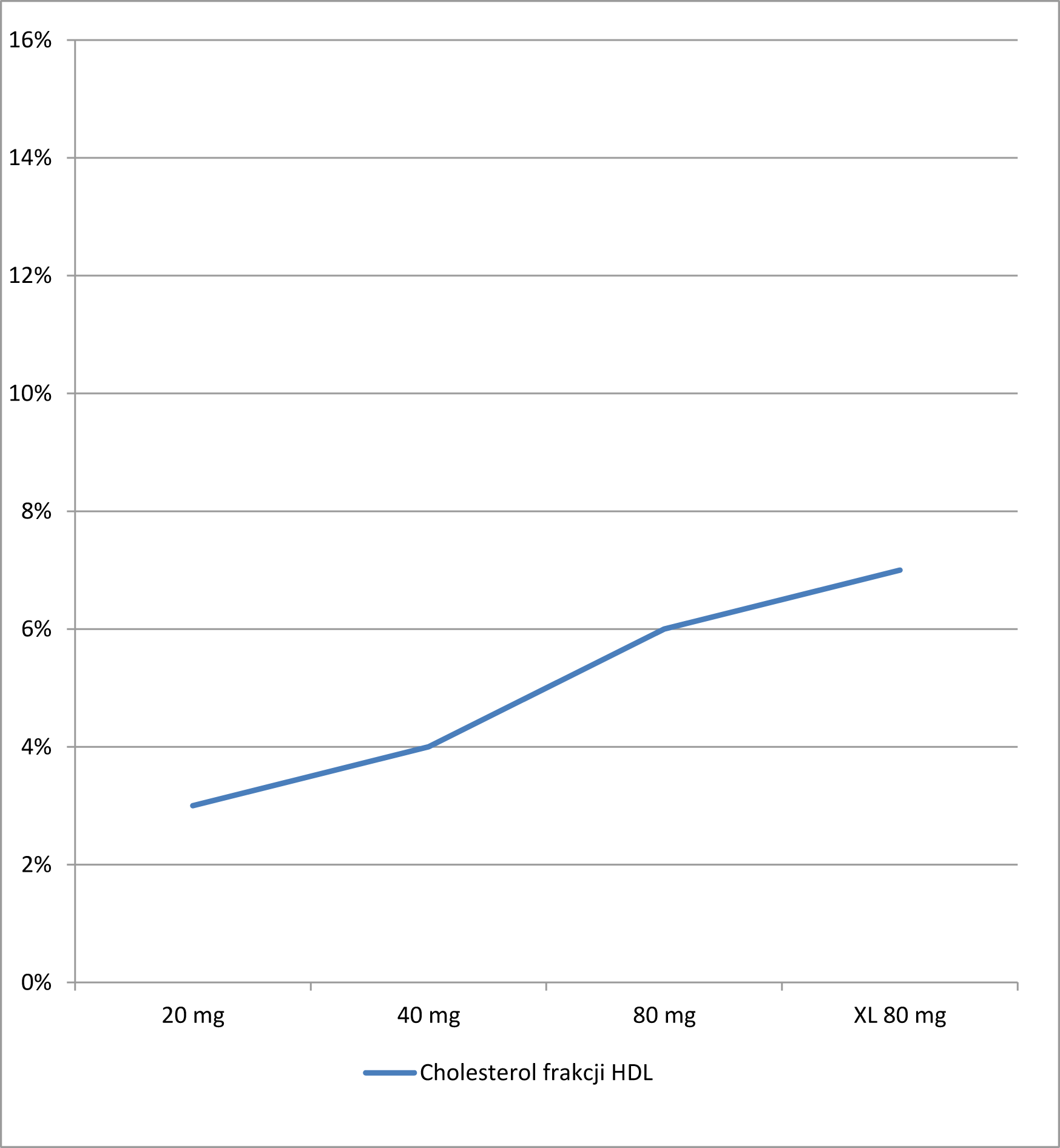 Wpływ fluwastatyny na wskaźniki lipidowe (dane do wykresu za Lescol® (fluvastatin sodium) capsules/ Lescol® XL (fluvastatin sodium) extended-release tablets for oral use)